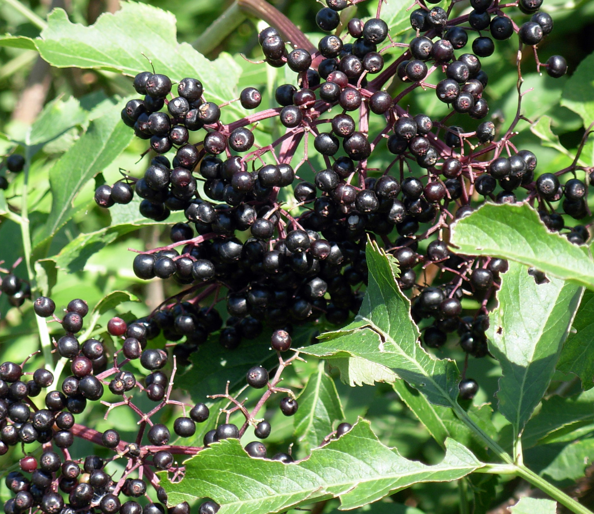 Ripe elderberries (Sambucus) in Rochester, Minnesota